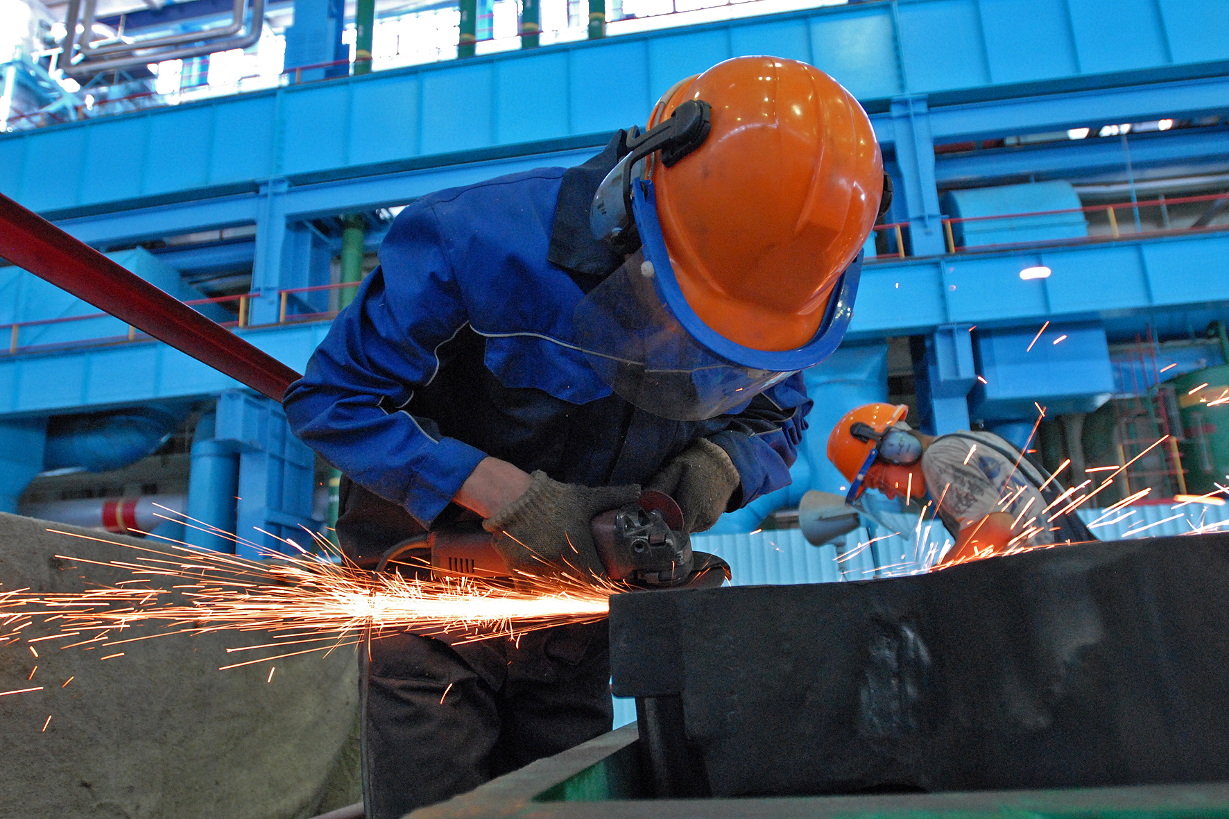 maintenance staff